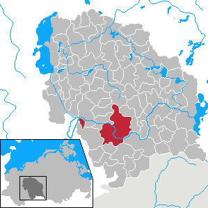 Parchim in Mecklenburg-Vorpommern - District Parchim